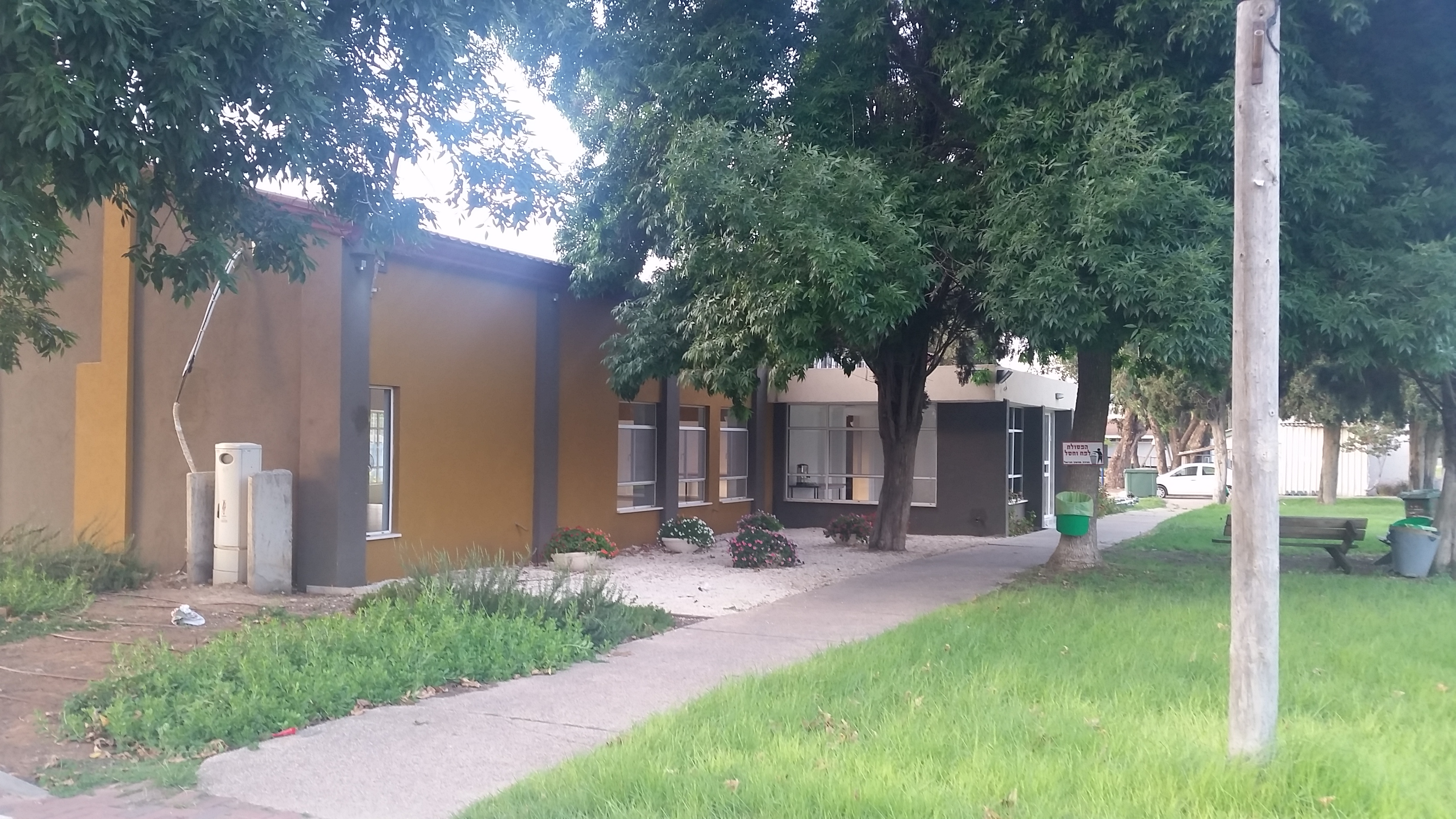 בית העם במושב חניאל